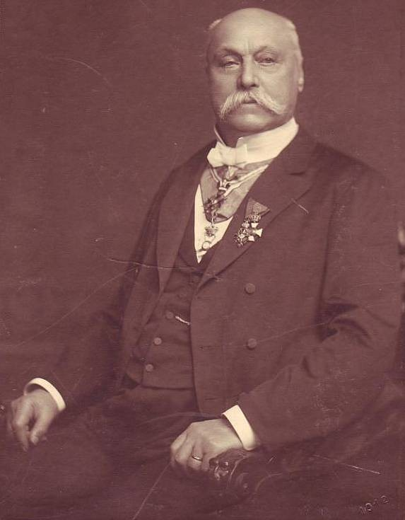 Antonín Steidl